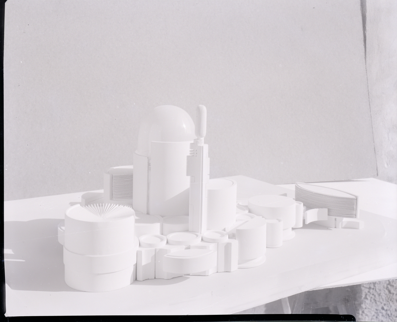 Servizio fotografico : Milano, 1961 / Paolo Monti. - Buste: 31, Fototipi: 34 : Negativo b/n, gelatina bromuro d'argento/ pellicola ; 10x12. - ((Serie costituita da 31 buste di negativi identificati con i nn.: 2957, 2958, 2959, 2960, 2961, 2962, 2963, 2964, 2965, 2966, 2967, 2968, 2969, 2970, 2971, 2972, 2973, 2974, 2975, 2976, 2977, 2978, 2979, 2980, 2981, 2982, 2983, 2984, 2985, 2986, 2987, 2988, 2989, 2990, 2991, 2992, 2993, 2994, e tenute insieme da una graffetta. - Le buste sono numerate da 1 a 31. - Alcuni negativi presentano segni di degrado (gelatina raggrinzita, bolle e alterazione tonale). - Sulla busta identificata con il n. 2957 iscrizione didascalica manoscritta a matita. - Fonte: Rubrica di Paolo Monti: Archivio 10x12 (ultimi numerati) - dal G1 al (s.d.), presso Archivio Paolo Monti